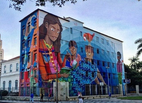 Graffiti Contos, localizado no Rio de Janeiro